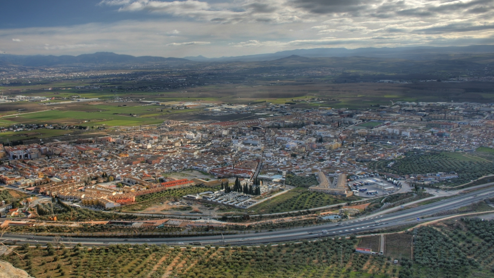 Atarfe hdr